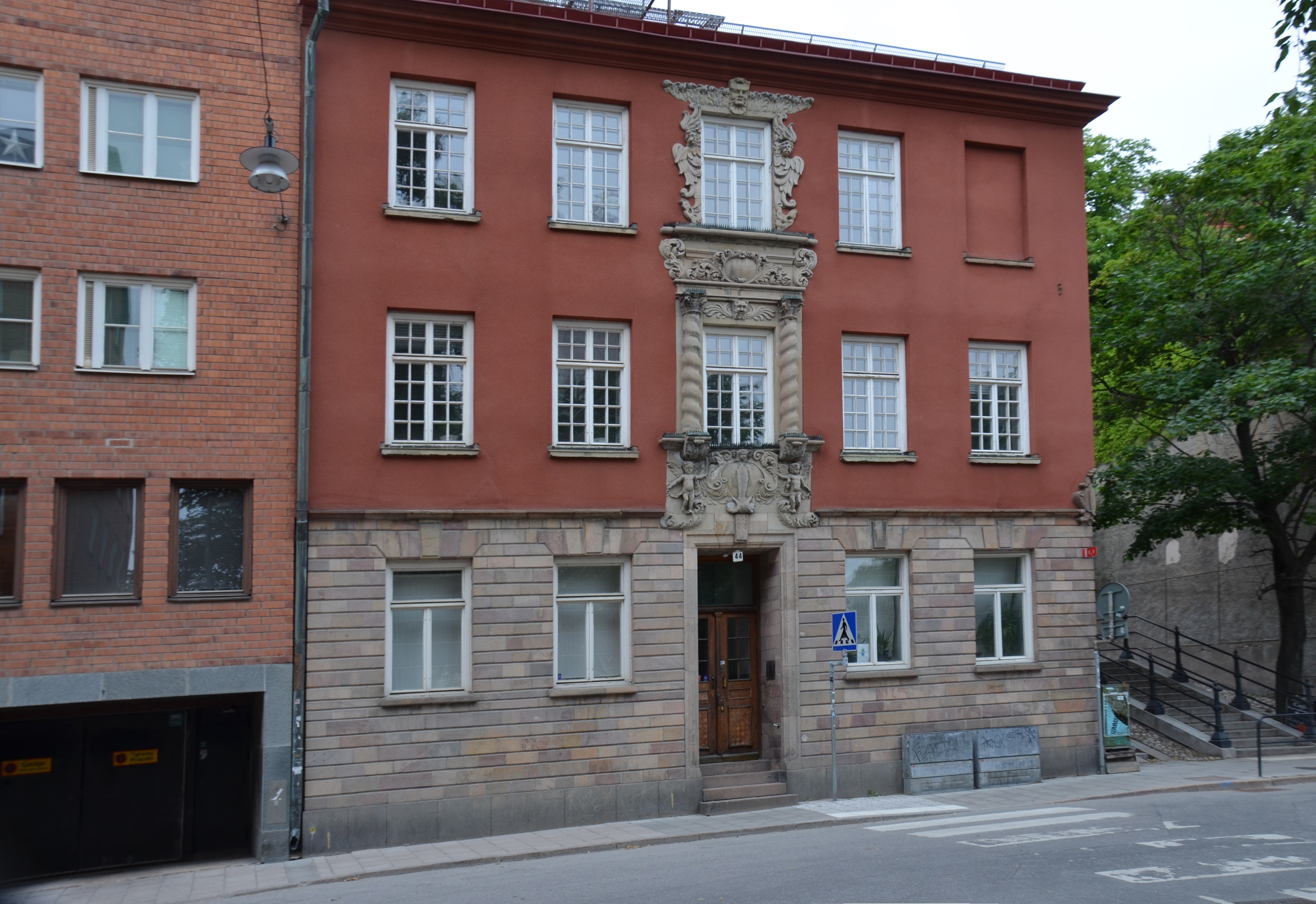 Huset Nederland Mindre 7 Högbergsgatan 44/Kvarngatan 44 på Södermalm i Sockholm. Byggt 1852 efter osignerade ritningar. Ombyggd mned stanbelagd bottenvåning och med skulpturala fönsteromfattningar i kalksten efter ritningar av Andreas Gustaf Sällström 1901-03